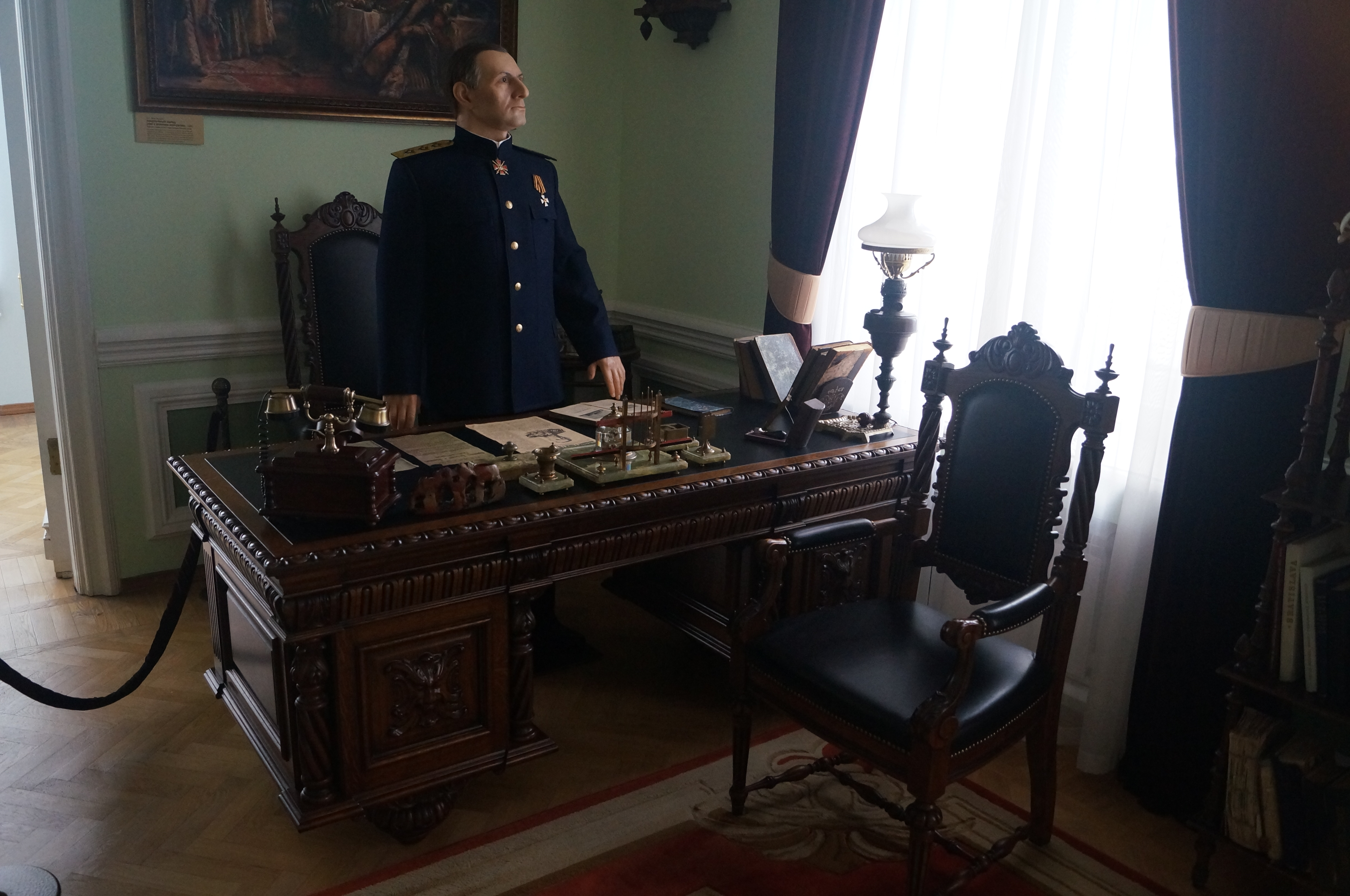 Восковая фигура А.В. Колчака в особняке Батюшкиных в Омске